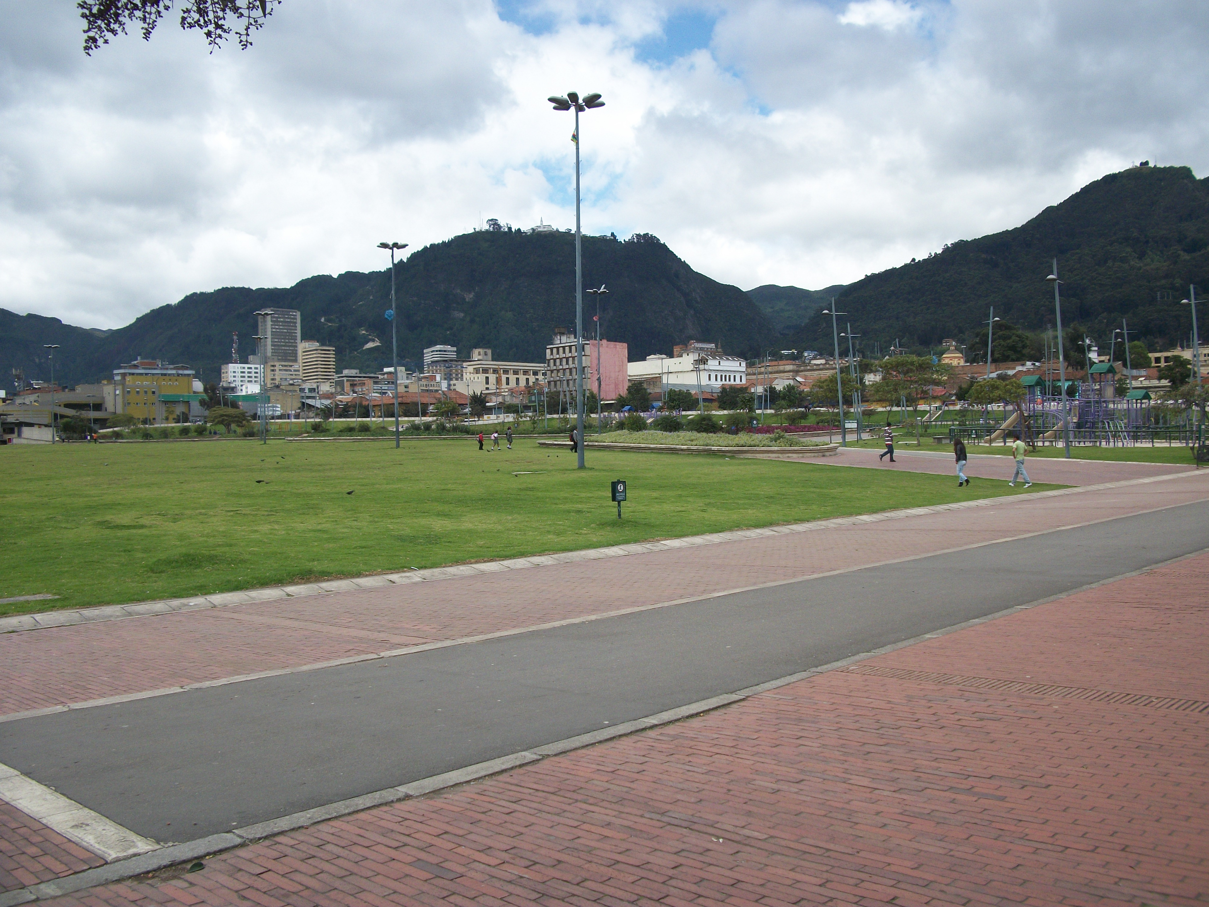 Parque Tercer Milenio en Bogotá, Colombia.